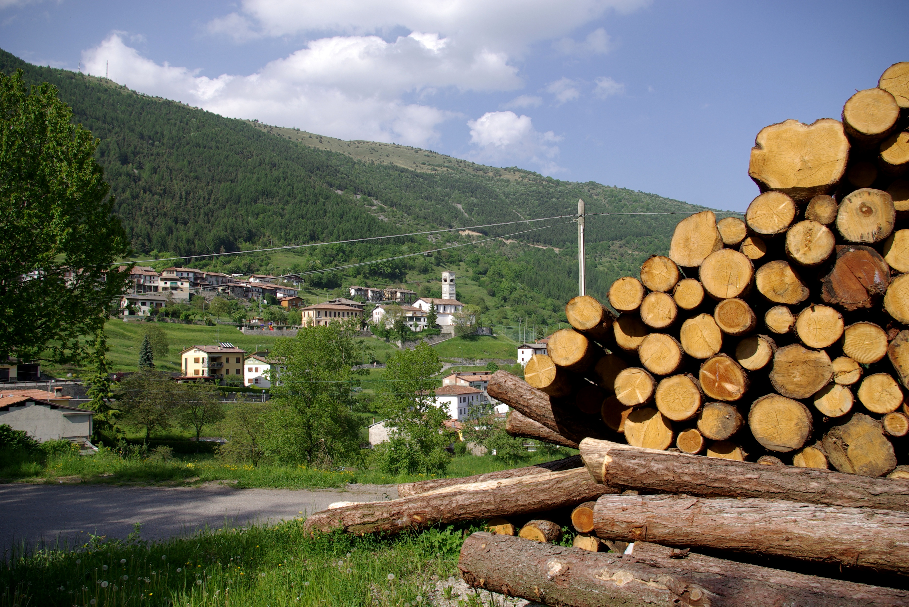 Blick von Südwesten auf die Ortschaft Zumiè in der Gemeine Capovalle in der Provinz Brescia